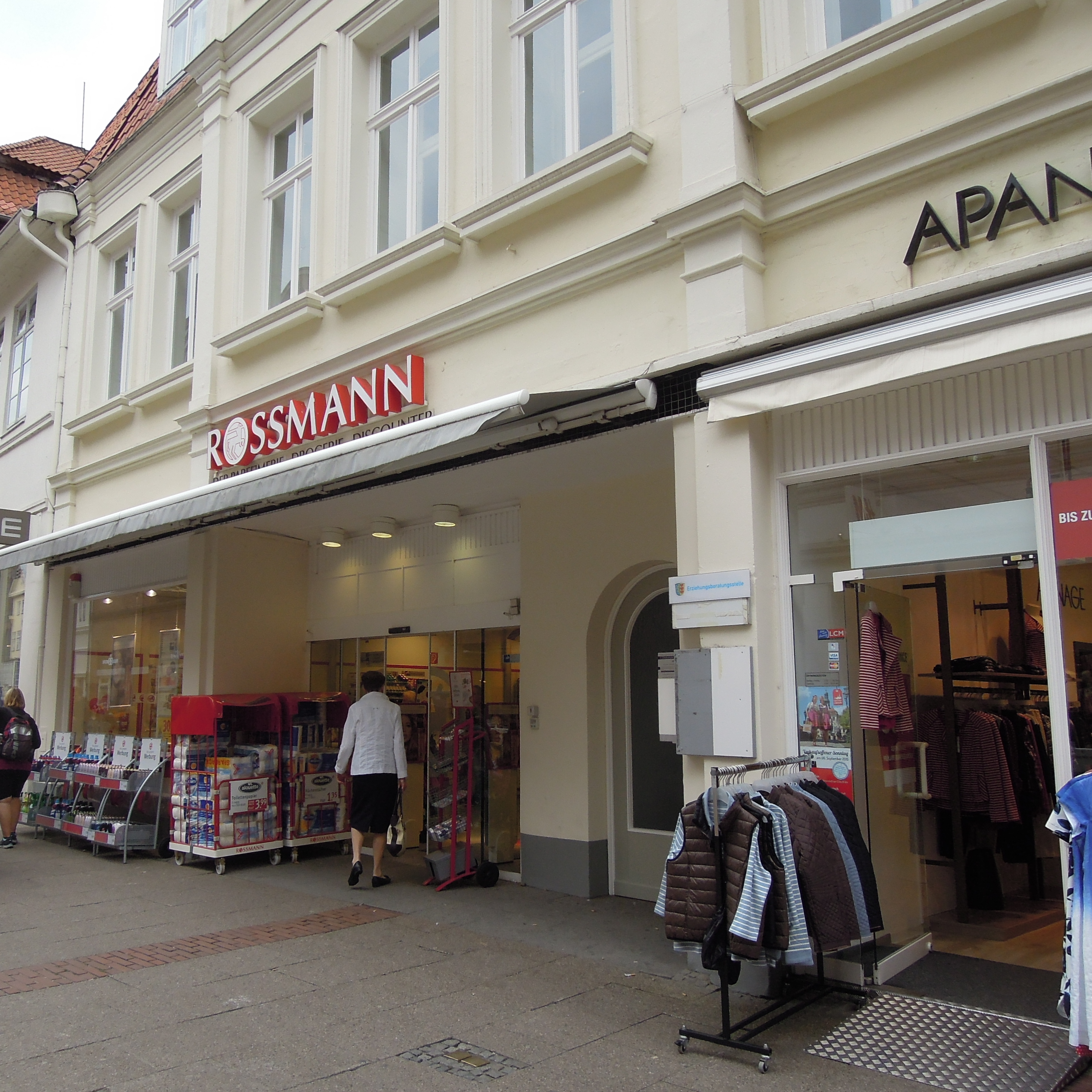 Stolpersteinlage Lüneburg Große Bäckerstraße 23